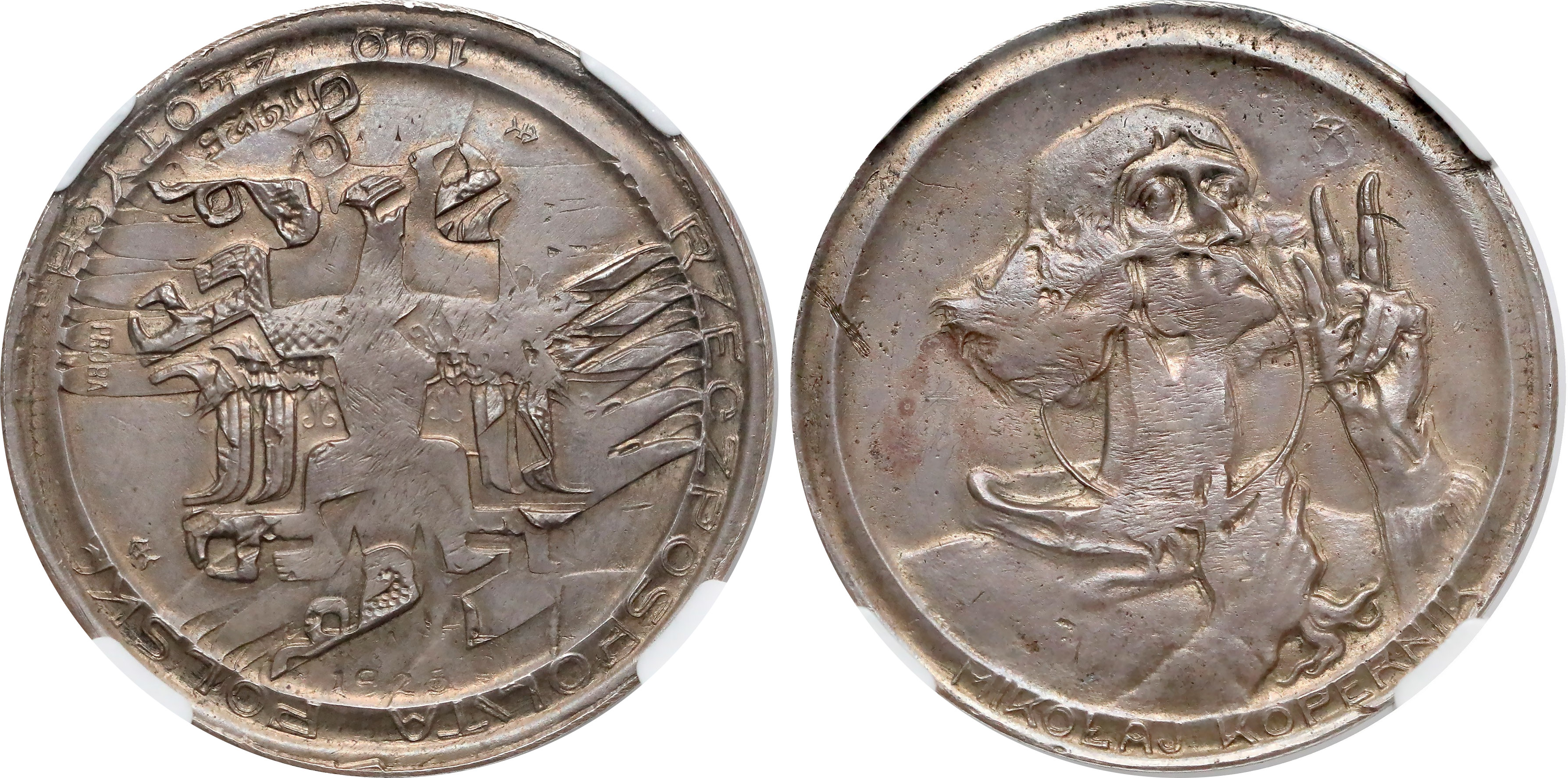 Próba na rosyjskim rublu 100 zlotych 1925 Mikolaj Kopernik duży